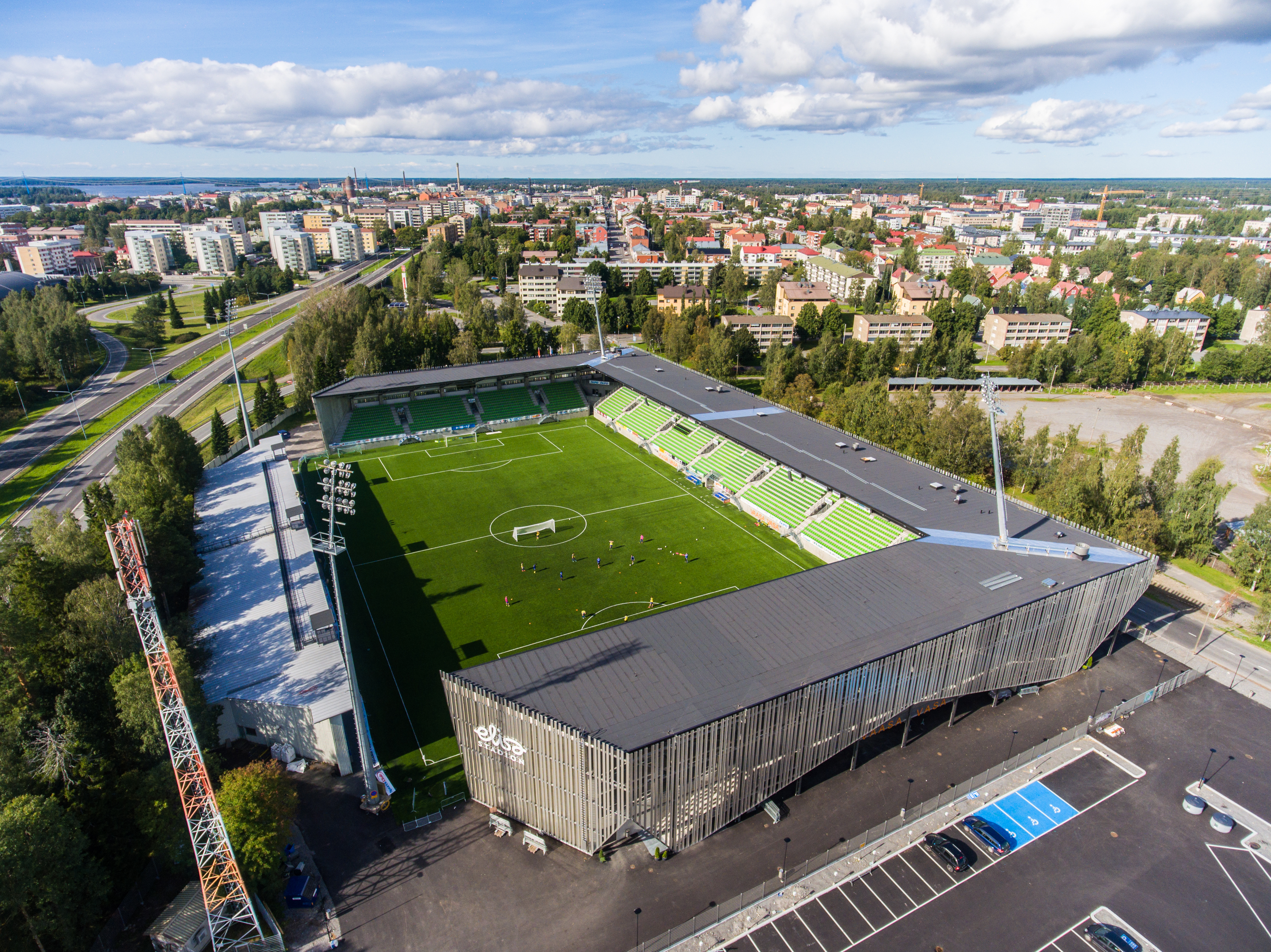 Elisa Stadion